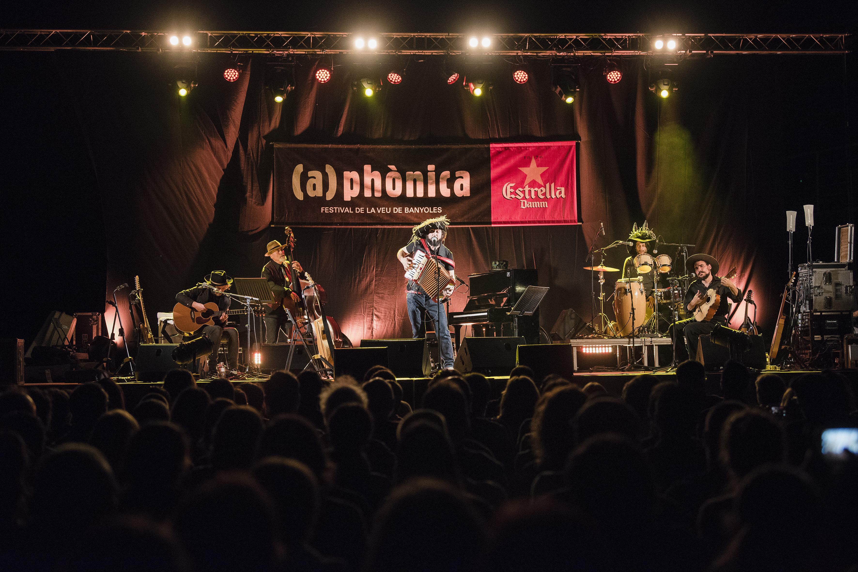 Concert de Vinicio Capossela a l'Estrella Damm Club Natació Banyoles, en el marc de l'(a)phònica 2018.